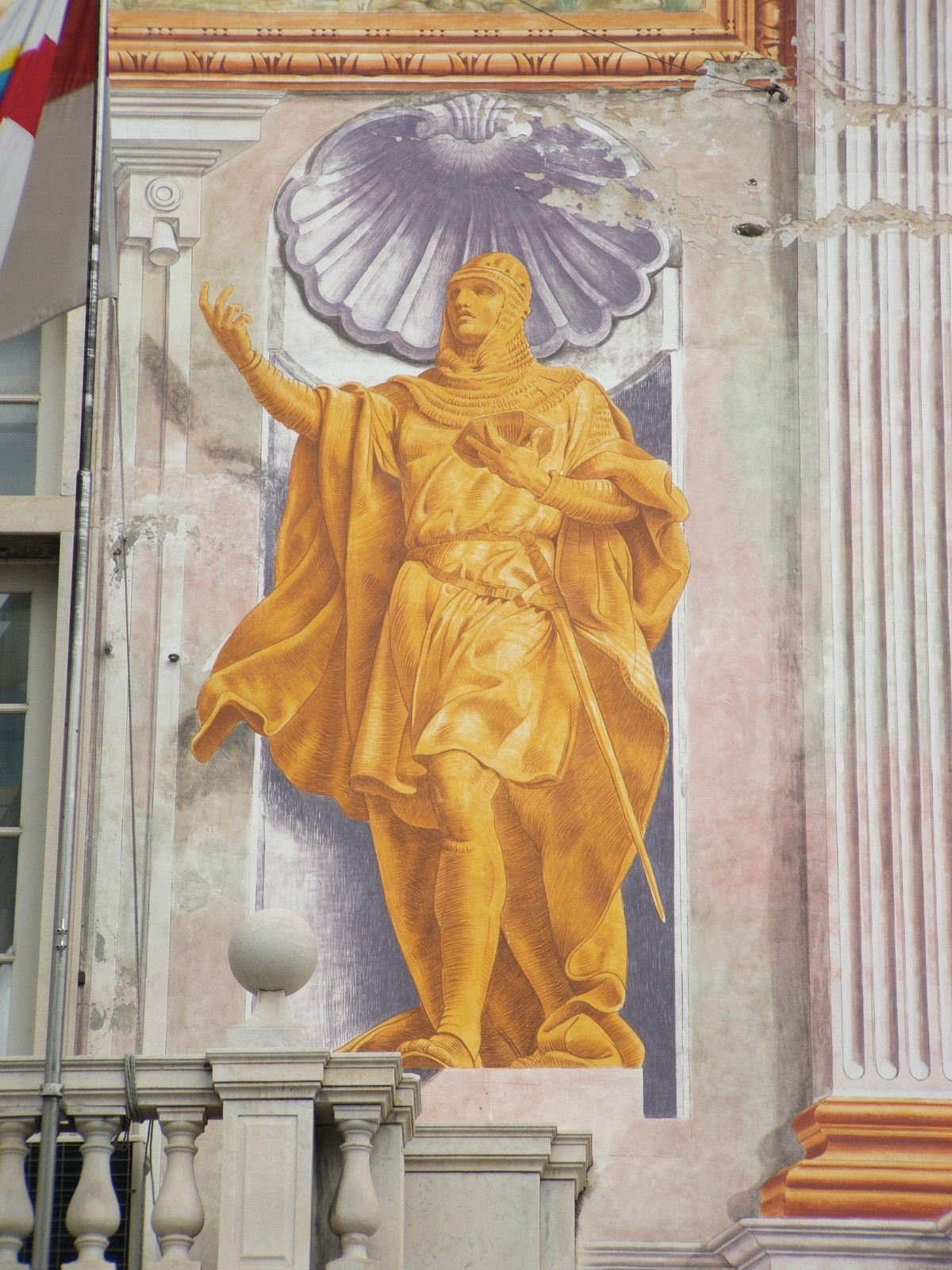 terza immagine da destra sulla facciata principale